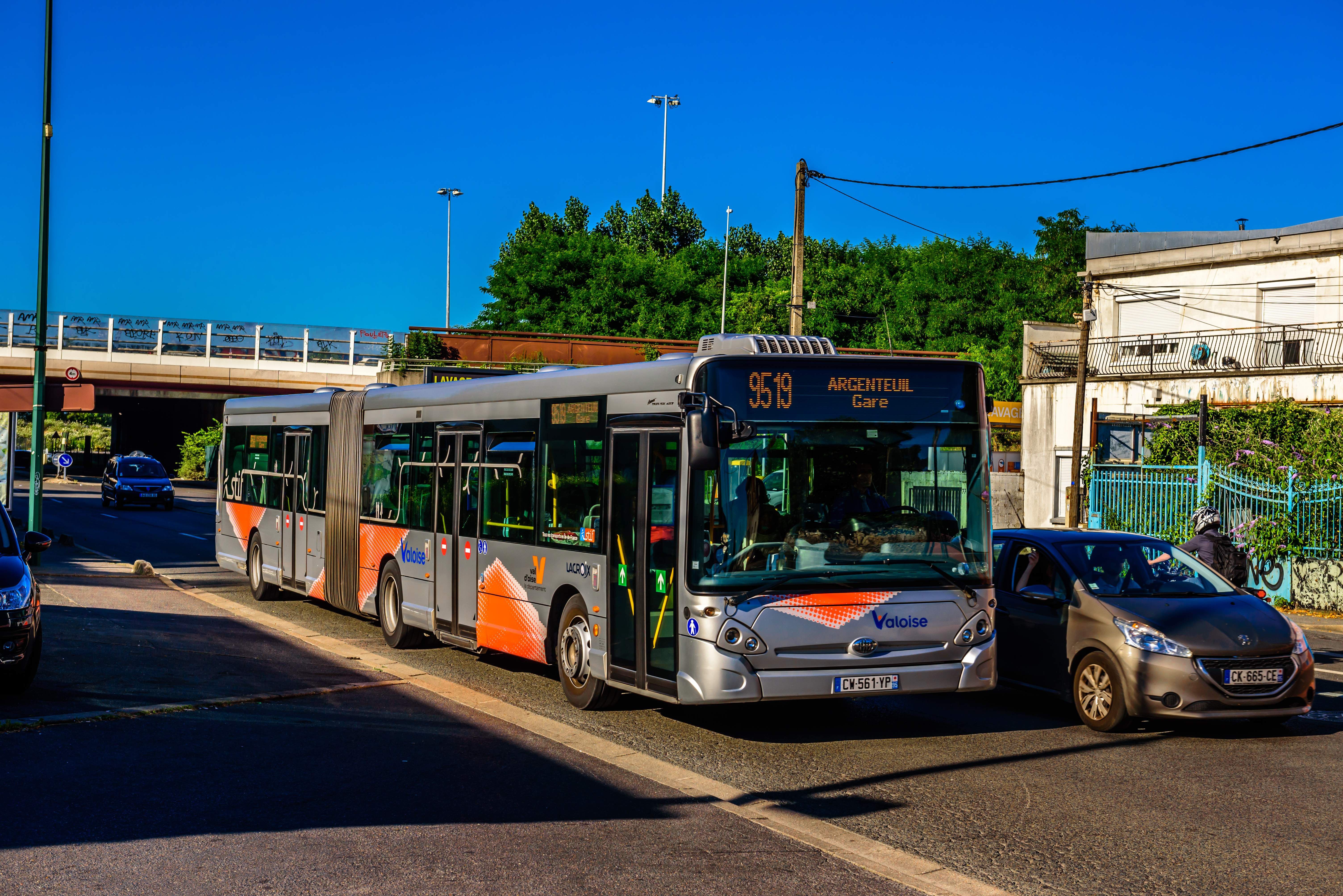 NB; grosse surprise que ce GX427, je ne pensais pas que les articulés du 95.19 circulaient l'été, j'ai donc pris à la volée... Et le lendemain, un Citaro STIF (sic!) sur le même service.... Bus transport in Paris and Île-de-France.